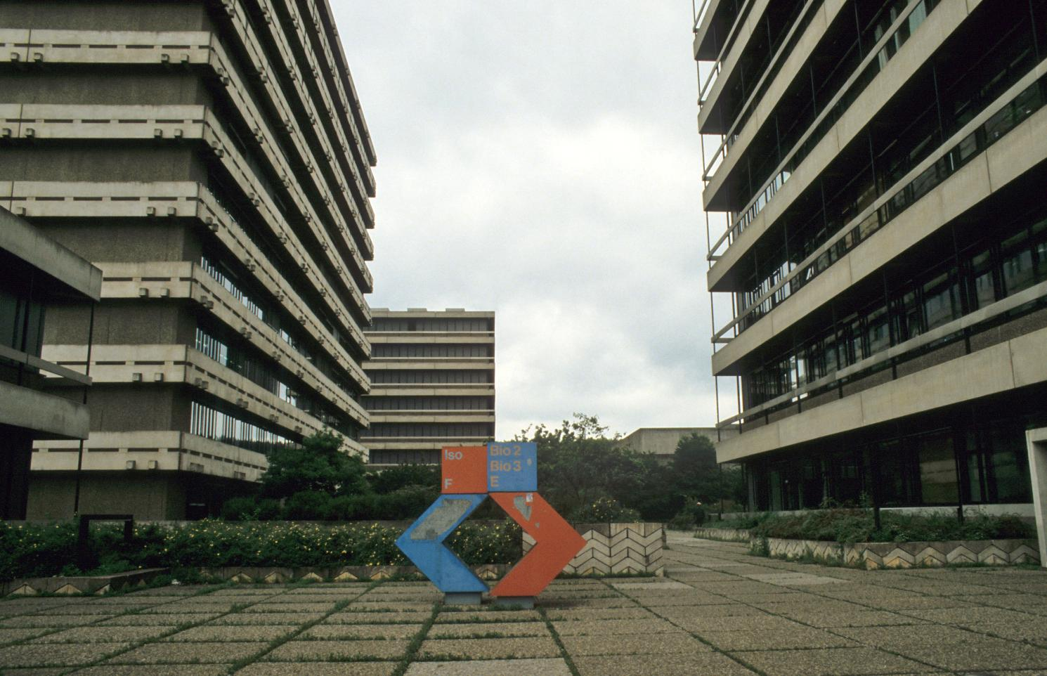 Zweckbauten der 1970er Jahre der Naturwissenschaftlichen Institute auf der Morgenstelle oberhalb Tübingen. Eigene Fotografie vom Juli 1986.